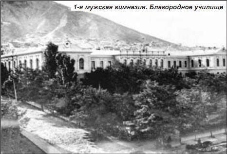 Здание 1-й Тифлисской гимназии архитектора Мельникова